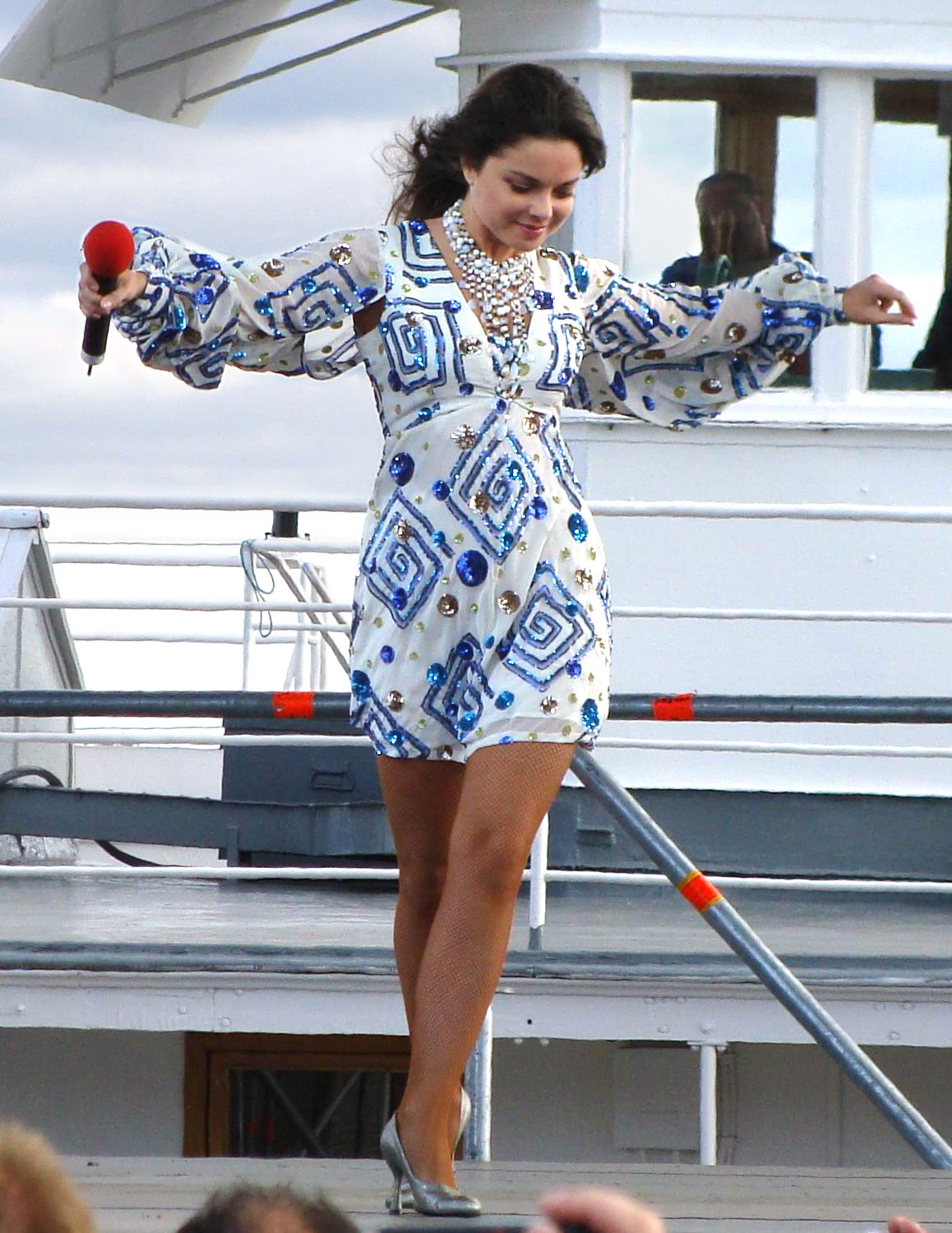 Наташа Королёва в Архангельске выступает совместно с программой Регины Дубовицкой - "Аншлаг" на юбилее, 425-летии города, в воскресенье, летом 28 июня 2009 года.